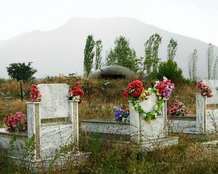 Bunker on graveyard